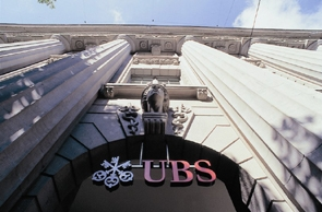 瑞银集团苏黎世总部